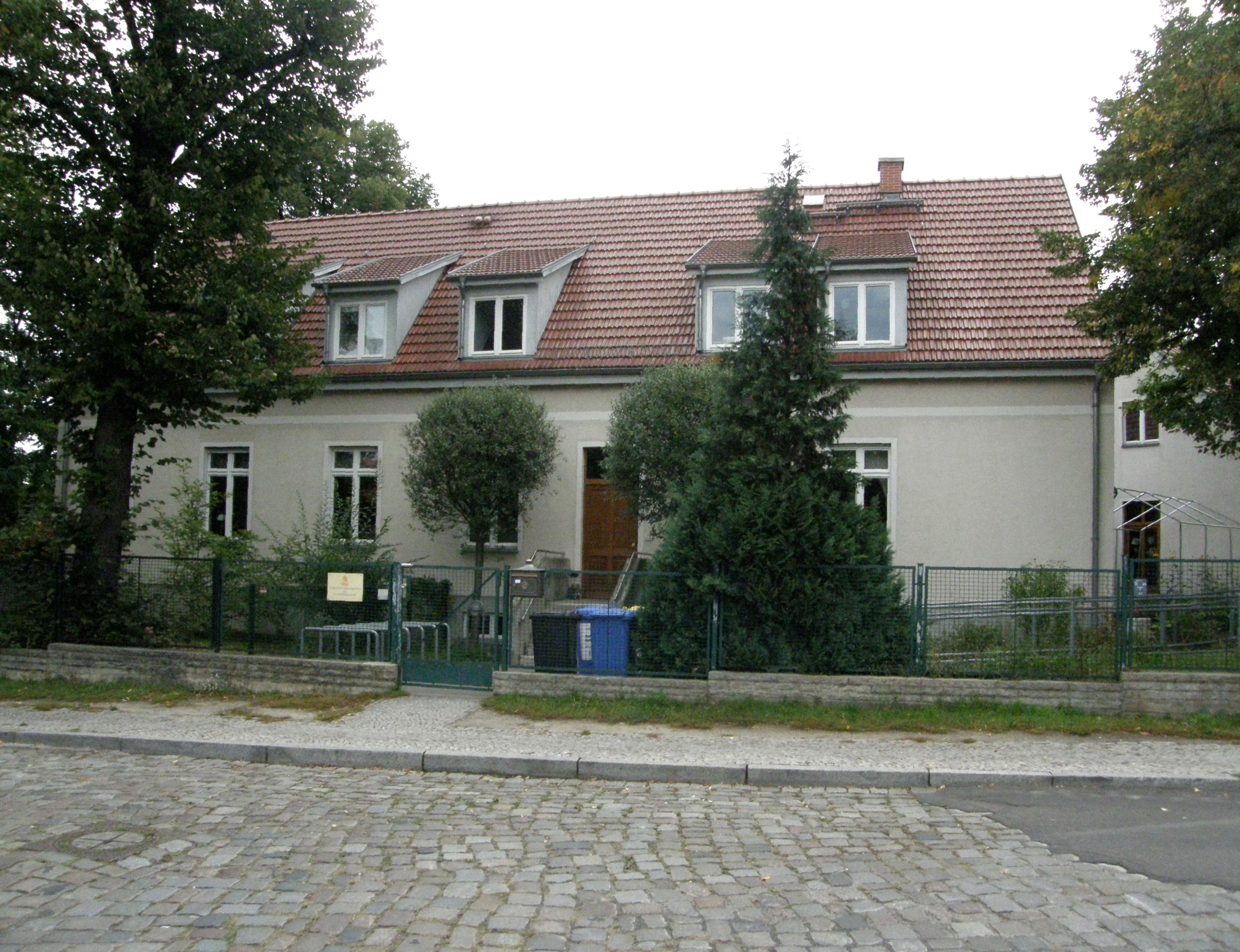 Berlin-Kaulsdorf, ev. KiTa der Dorfkirche